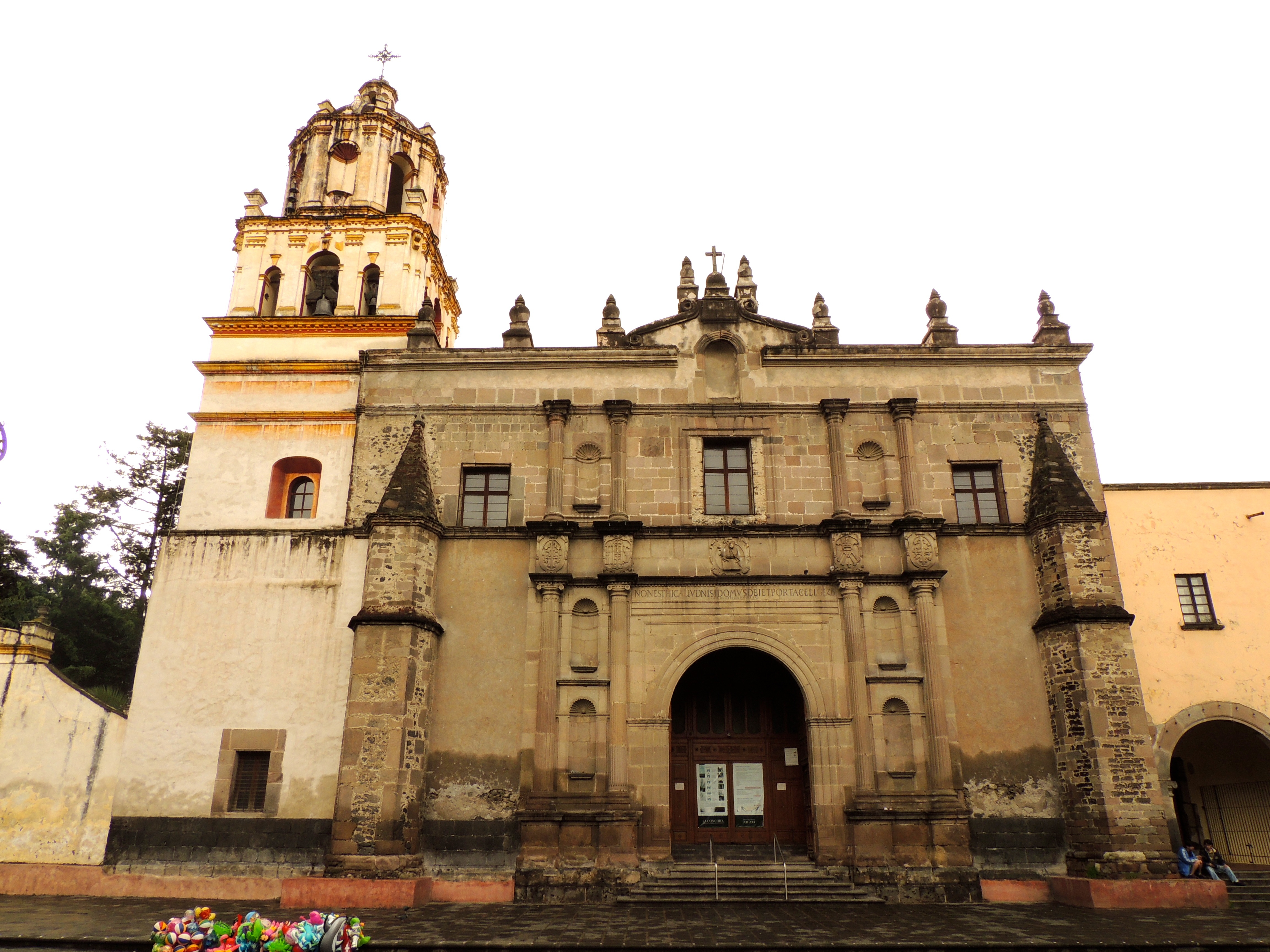 Iglesia de San Juan Bautista (Coyoacán)